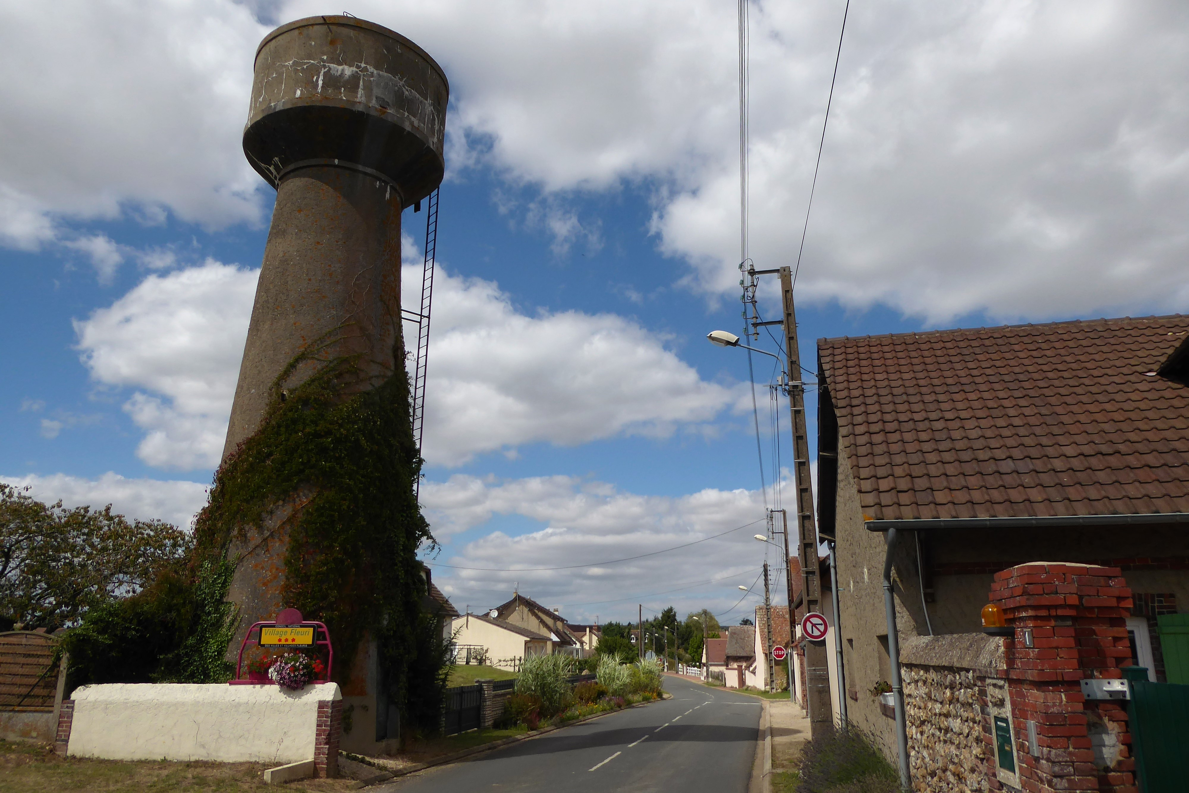 entrée de Cintray par la D123 en provenance de Saint-Georges-sur-Eure, le château d'eau, Eure-et-Loir, France.